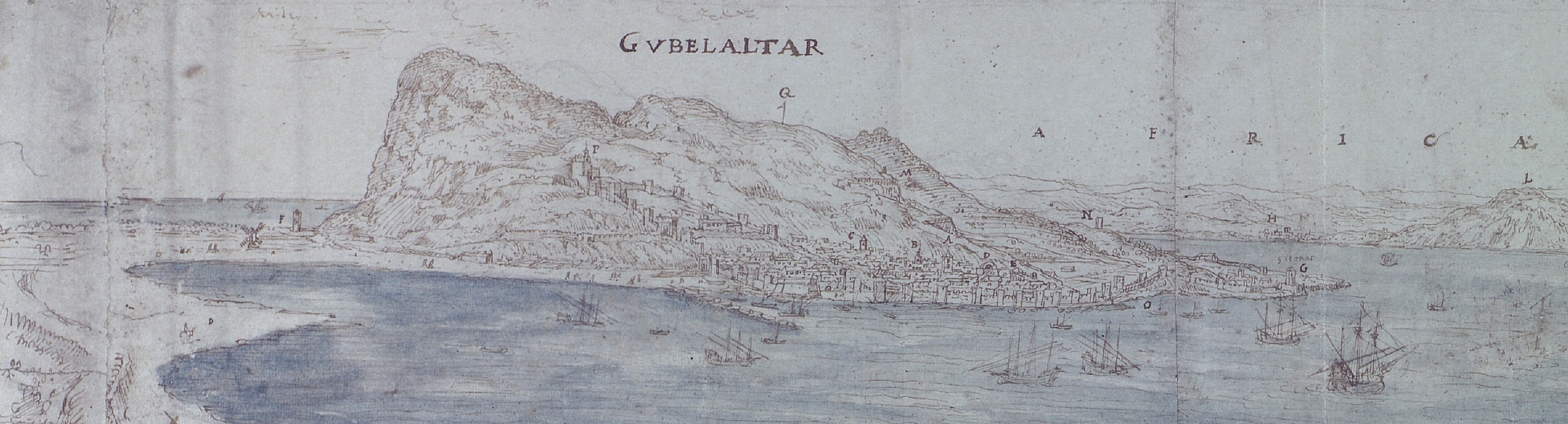 Gibraltar en 1567. Tomado de la 'Vista panorámica de la bahía de Gibraltar hacia la ciudad con la costa africana al fondo' de Anton van Den Wyngaerde conservado en el Ashmolean Museum de Oxford (verificación aquí). Ilustración escaneada del libro Ciudades del Siglo de Oro. Las vistas españolas de Anton van den Wyngaerde, Madrid (2008). Dirigido por Richard L. Kagan. En el dibujo se distinguen los siguientes elementos: A. Sta maria eglyesia mayor (iglesia parroquial, actual catedral de Santa María la Coronada) B. La misericordia (hospital de la Misericordia) C. Sto juan de Letran (iglesia de San Juan de Letrán) D. Sto francisco (iglesia de San Francisco) E. nro sra del Rosario (ermita de Nuestra Señora del Rosario) F. La torre del Diablo G. La torre torto (torre del Tuerto) H. Ceuto (Ceuta) L. La Cymera (Monte Musa, el monte Abila, una de las Columnas de Hércules) M. Cueue Sto mychyl (cueva de San Miguel) N. La torre de los tarfes (torre de los Tarfes) O. aqui fu La Batalla de don henryco (Arenales Colorados, aludiendo a Enrique Pérez de Guzmán, segundo conde de Niebla, muerto en su intento de tomar la ciudad) P. el Castyllo (Castillo Moro) Q. La guardya de dio (guardia de día, aludiendo al puesto de vigilancia situado en el Hacho).